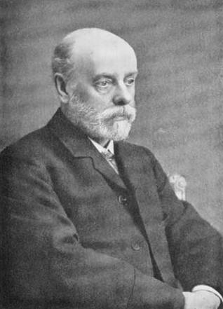 Vero Charles Driffield (1848-1915)